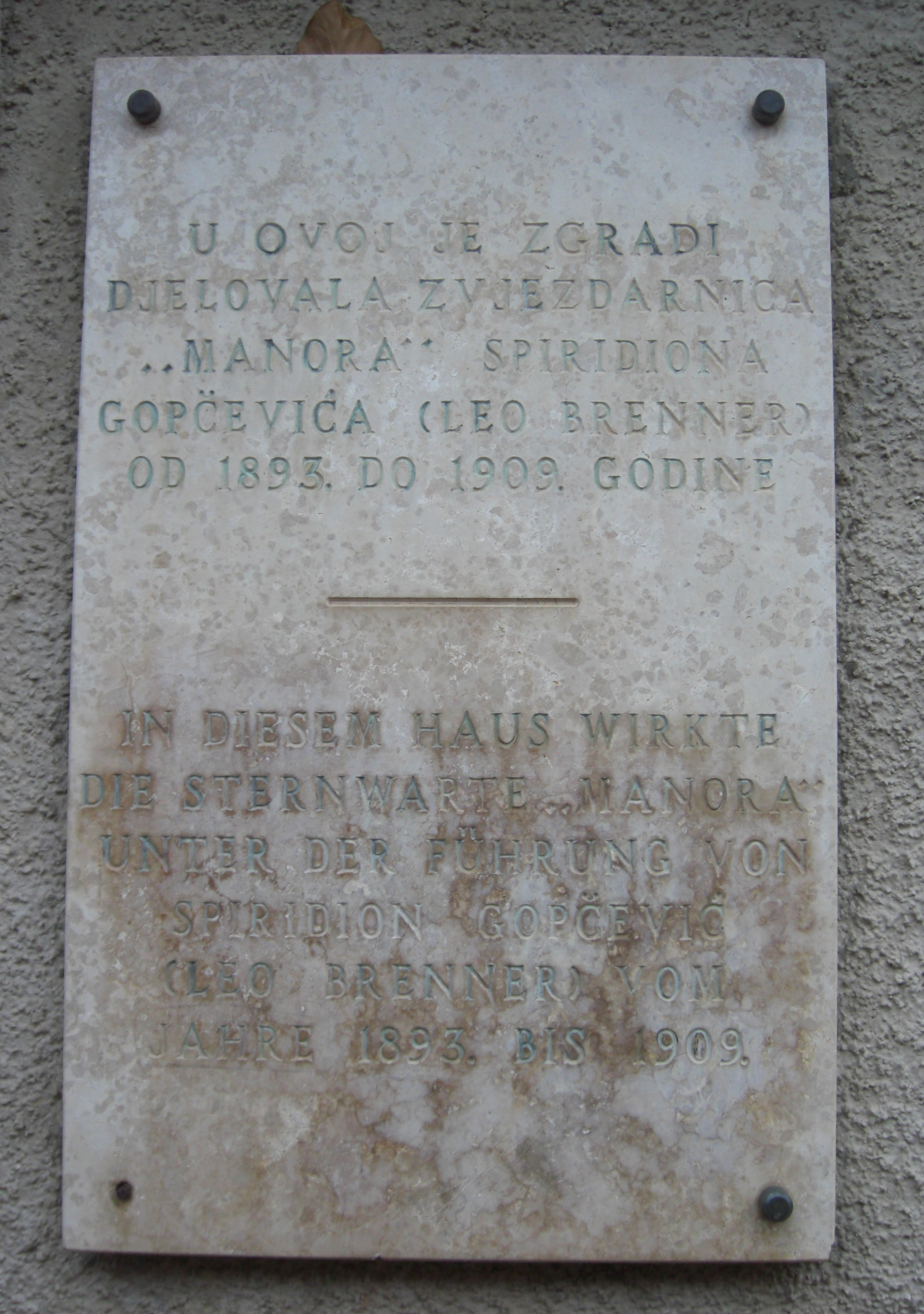 Gedenktafel für den Astronomen Spiridon Gopčević (Leo Brenner, 1855-1928) auf der kroatischen Insel Mali Lošinj